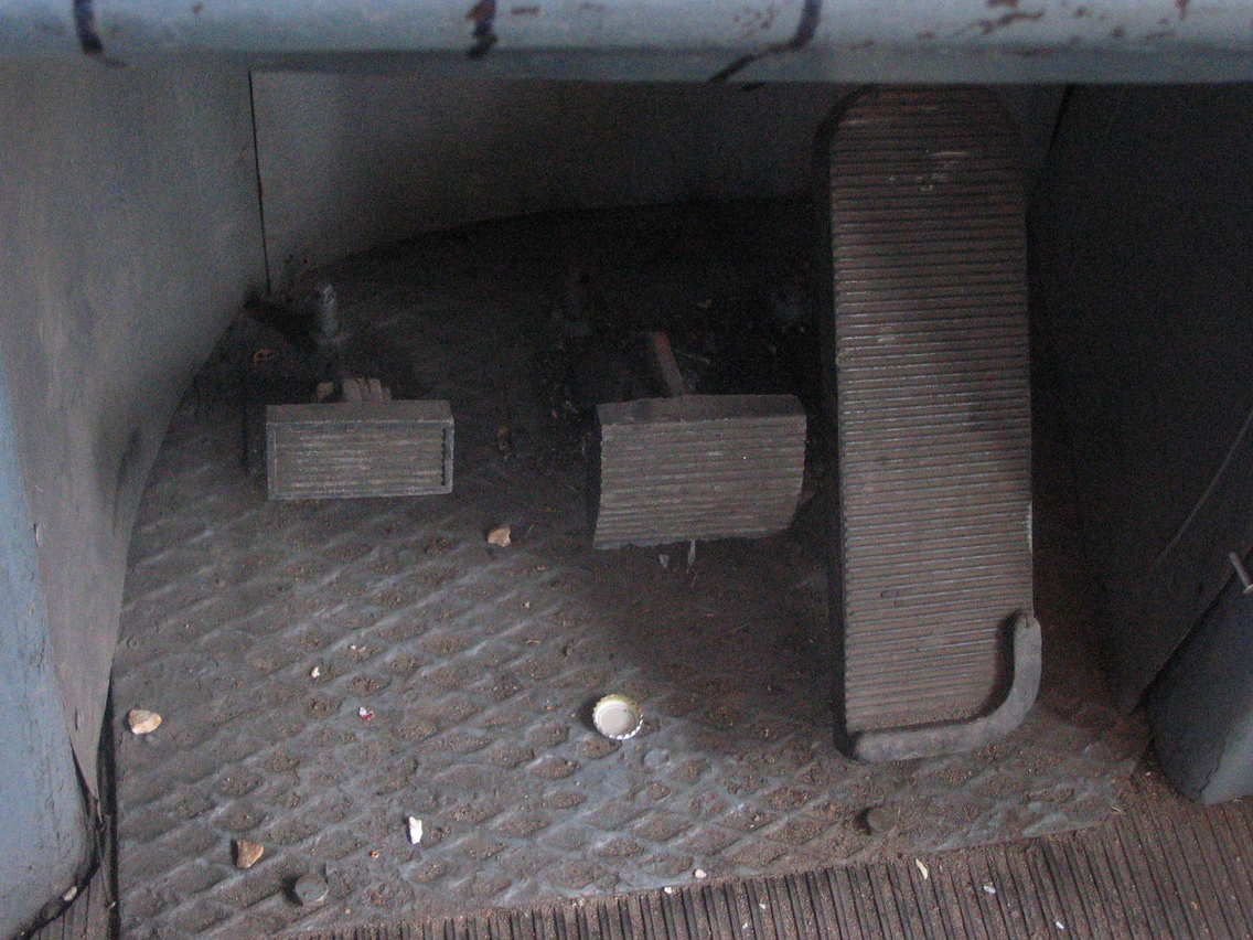 Pedały sterownicze w warszawskim tramwaju Konstal 13N.